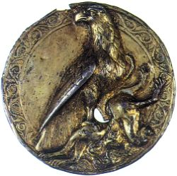 Արտաշեսյանների զինանշան՝ հովազին հոշոտող արծիվ